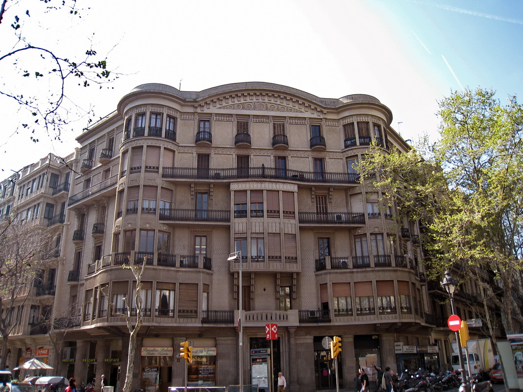 Casa Francesc Coll Portabella, Gran Via de les Corts Catalanes 464 (Barcelona, Catalunya), obra d'Eduard Ferrés de 1913